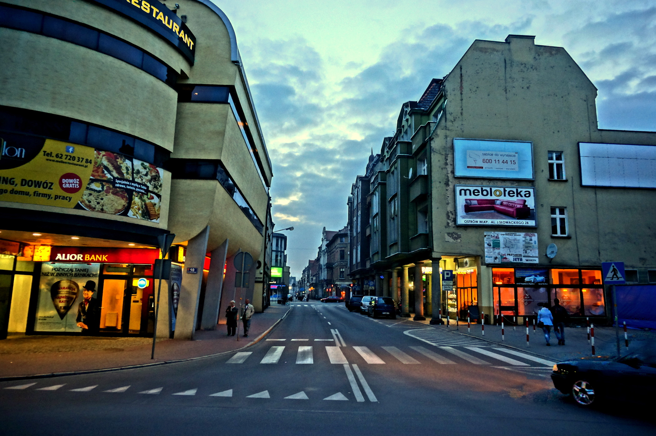 Ostrów Wlkp., ul. Kolejowa o zmierzchu